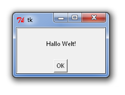 tkinter-Beispielprogramm, "Hallo Welt"